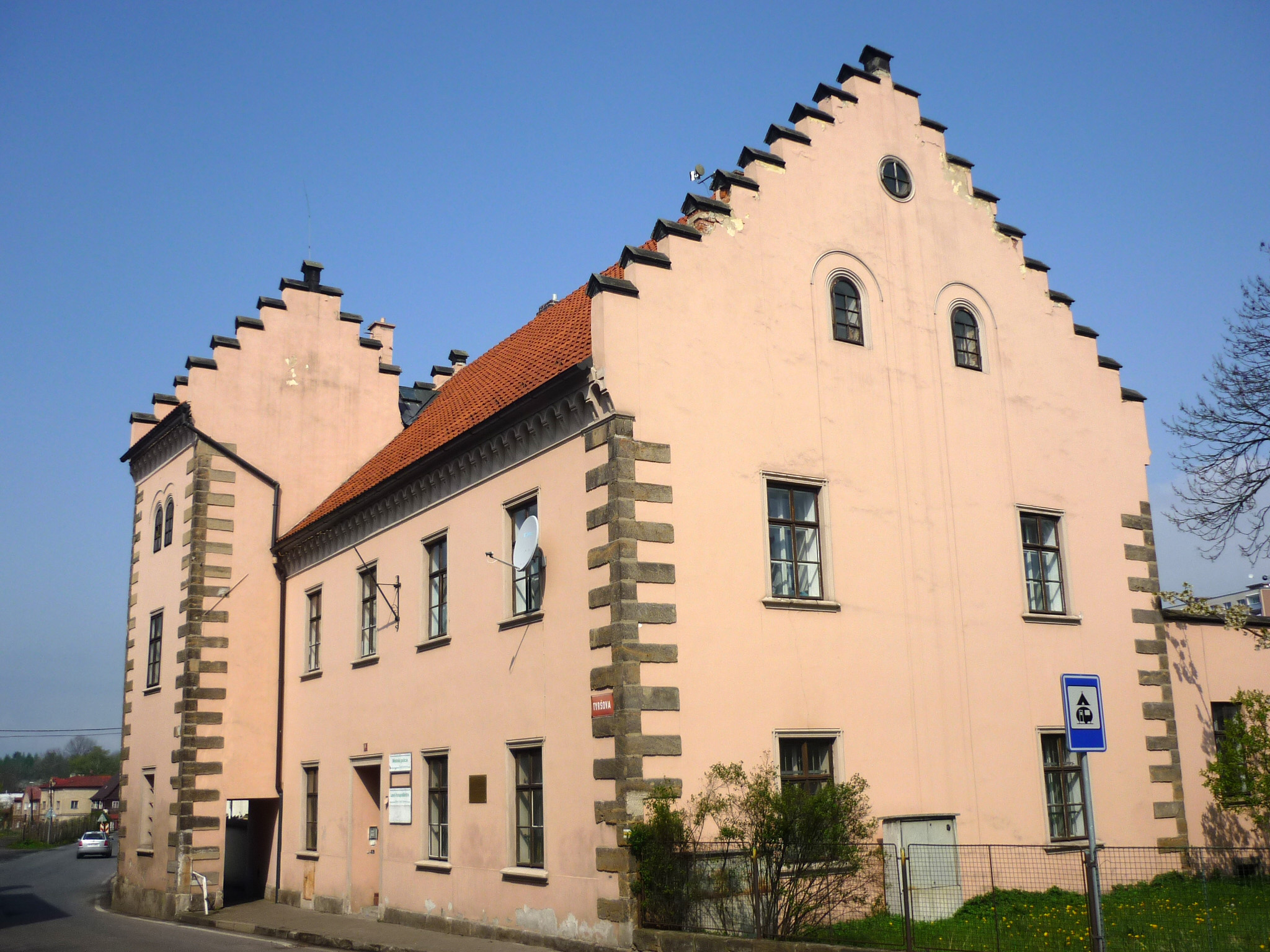 Saalhausener Schloss in Böhmisch Kamnitz (Česká Kamenice )